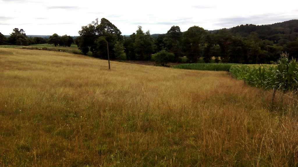 Vista da Casanova, Curtis.